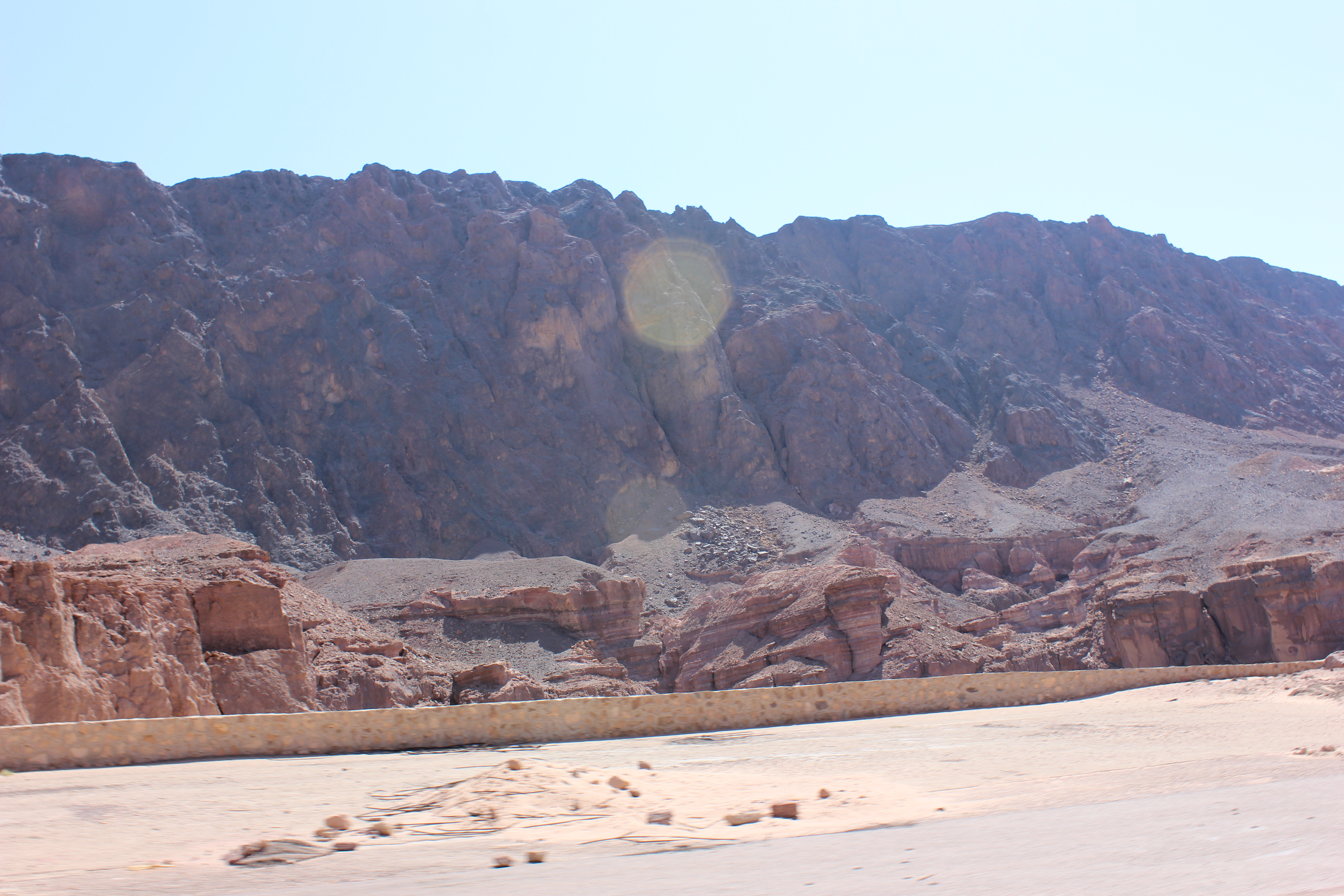 أحد الجبال في سيناء في طريق طابا-نويبع.